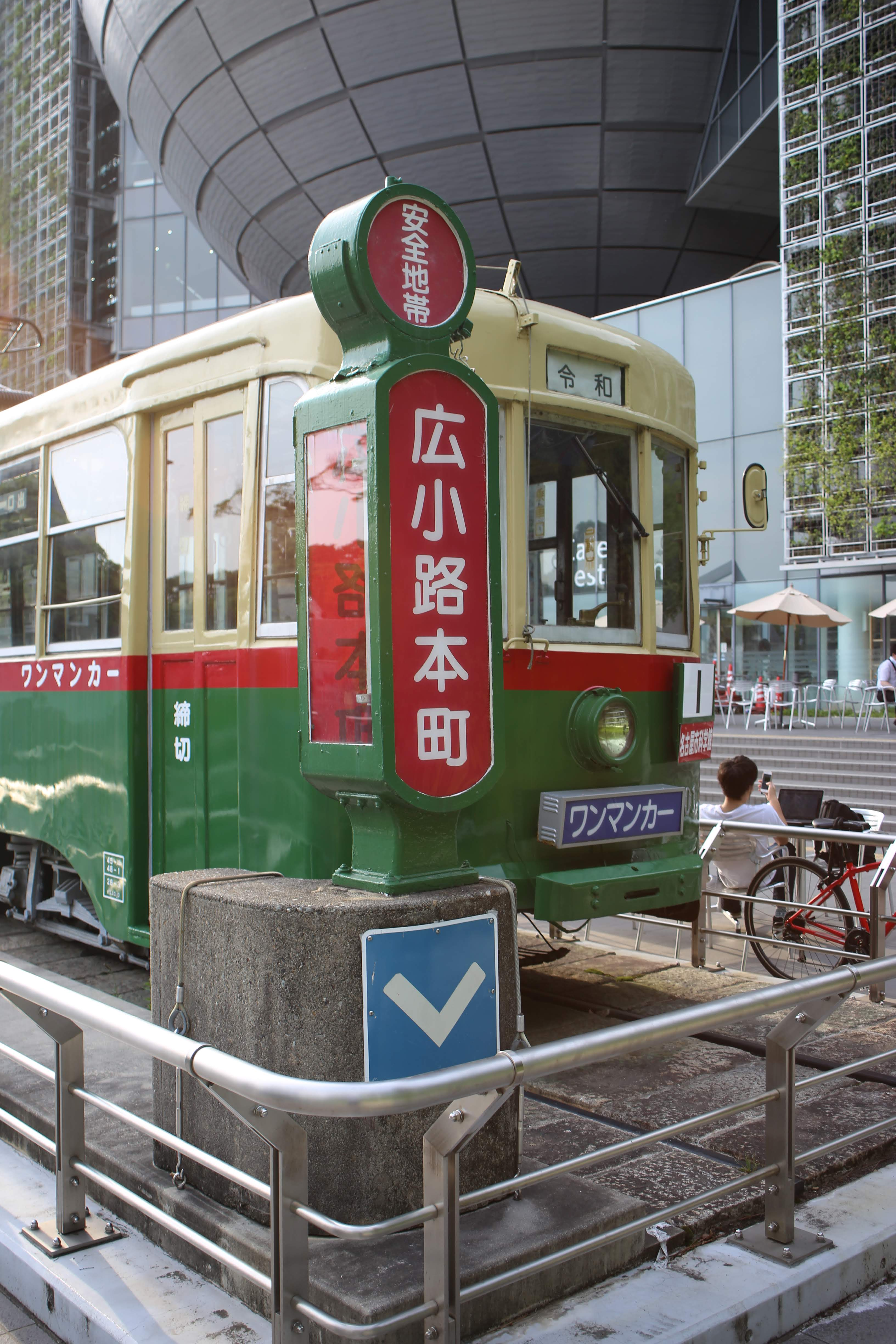 名古屋市電1401（名古屋市科学館）